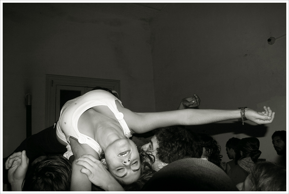 Montevideo y su under. 2009.